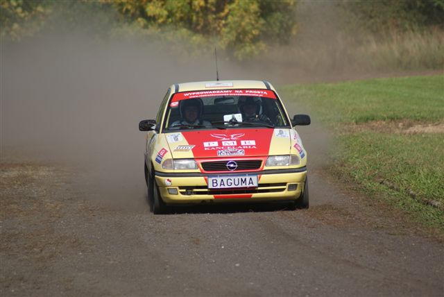 3. Rajd Pleszewski